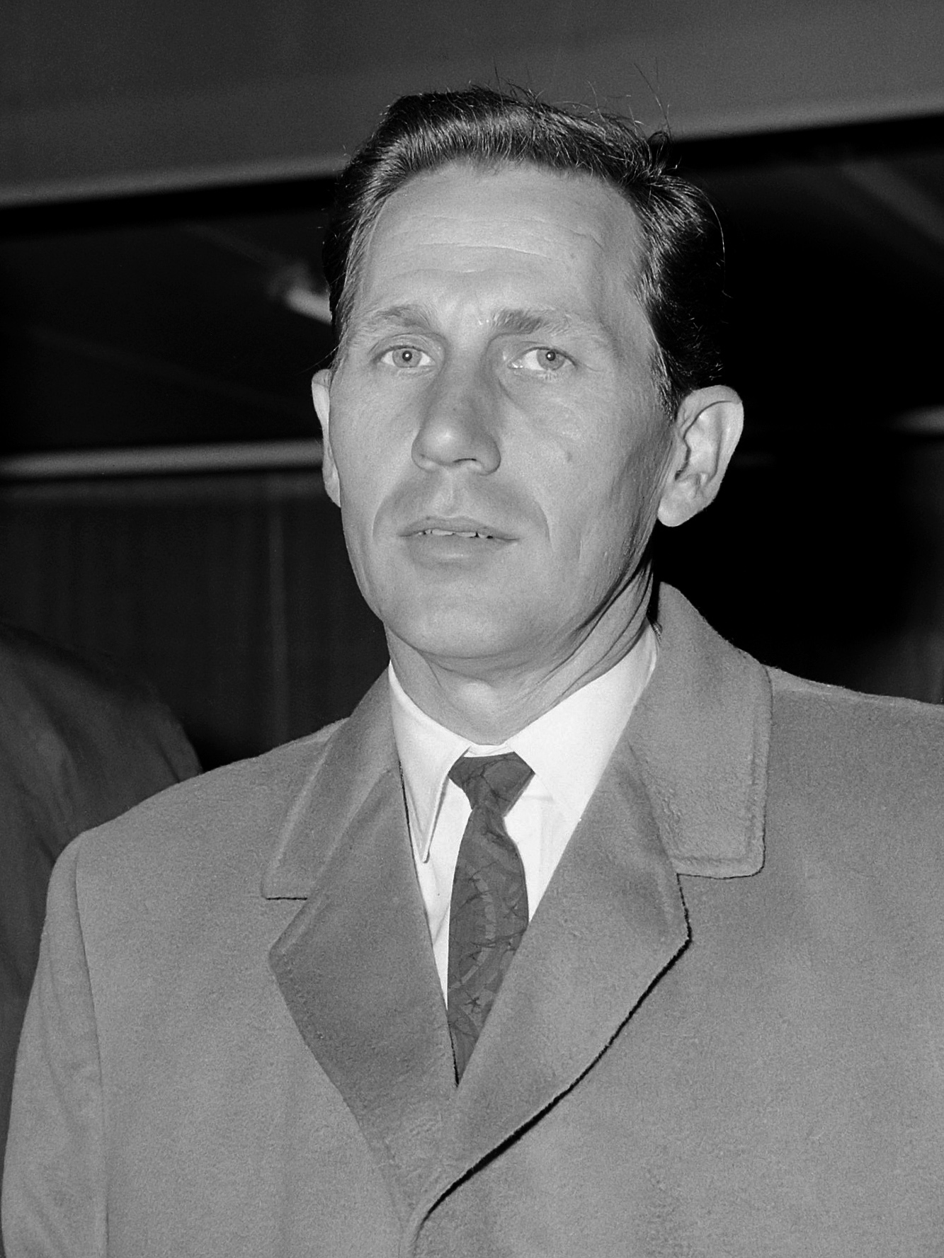 Aankomst Floyd Cramer (links) met The Anita Kerr Singers op Schiphol, Chet Atkins (kop) gitarist 4 mei 1965